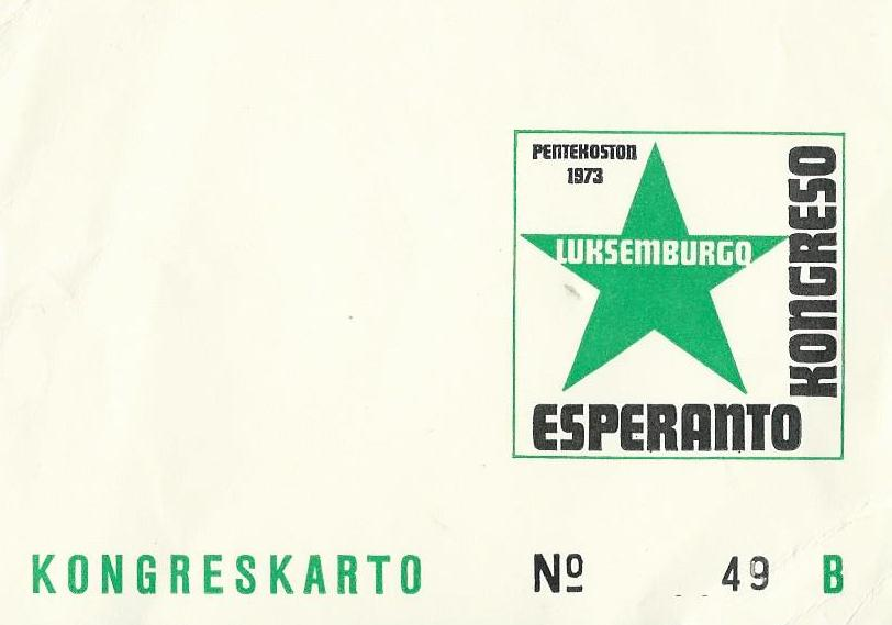 Kongreskarto, Luksemburgo, 1973 / FelixArchief 2233-394, Antverpeno